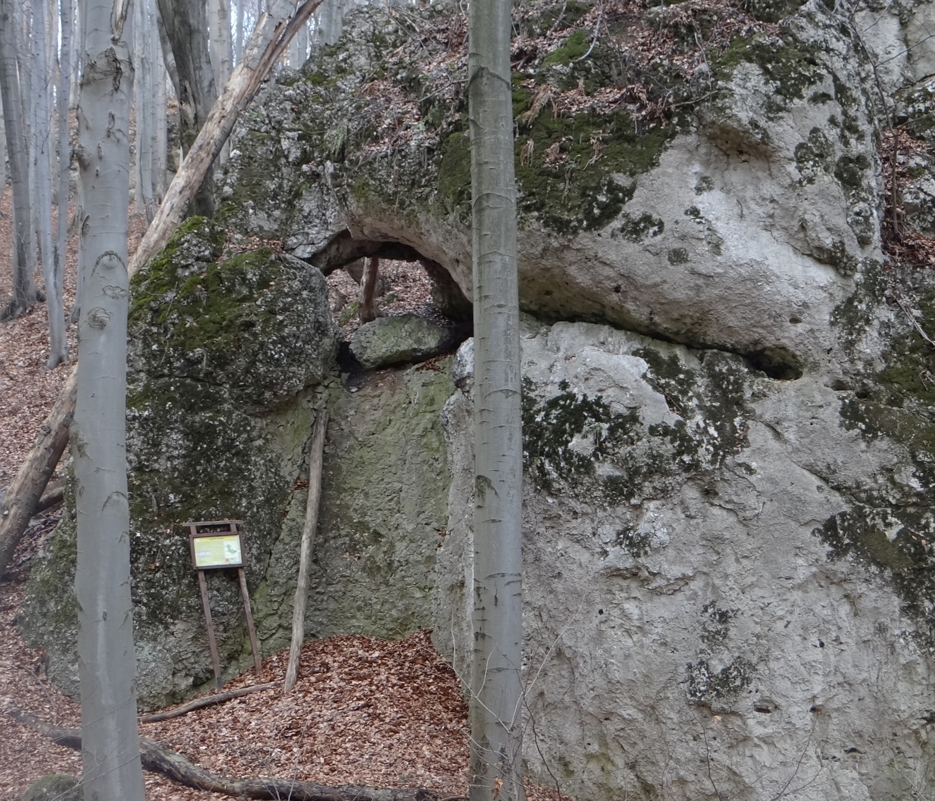 Południowy otwór Schroniska Żarskiego I